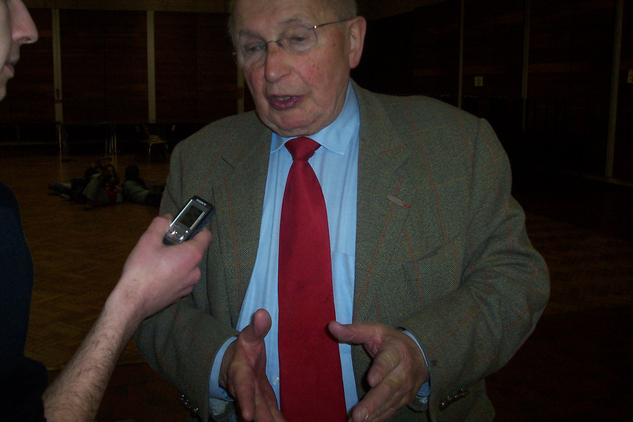 Louis Mexandeau à Mondeville le 15 février 2008